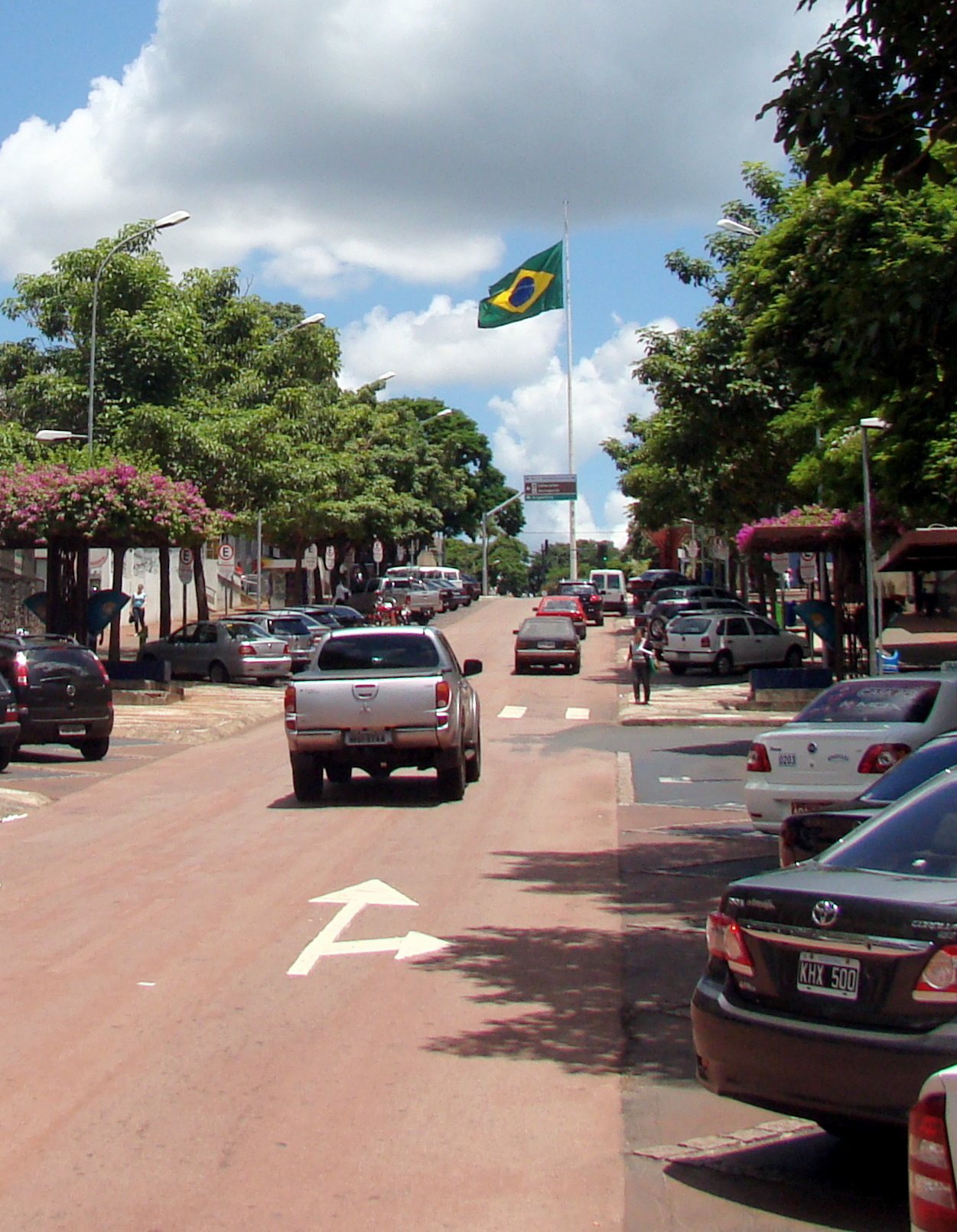 Vista da Avenida Brasil em Foz do Iguaçu, Paraná, Brasil. A bandeira nacional indica o Marco Zero da cidade.